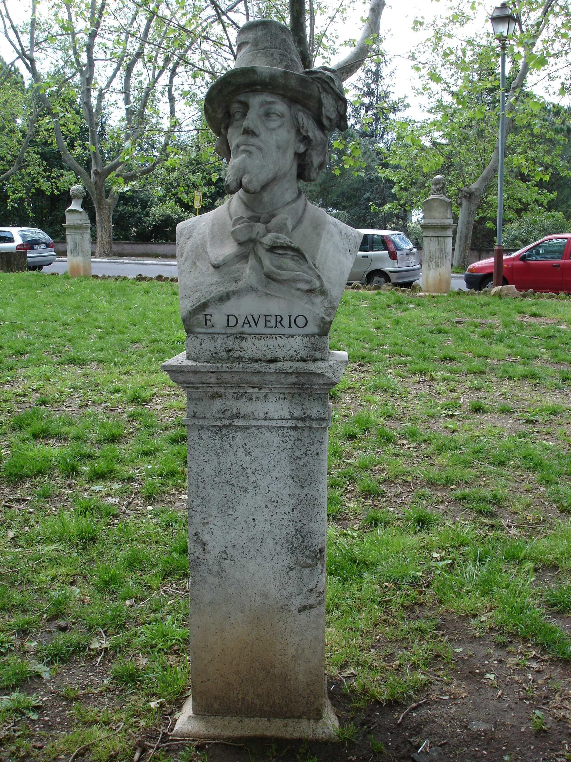 Busto di Francesco Daverio (Calcinate del pesce (Varese) 1815 - Roma 1849) sul Gianicolo, a Roma. Capo di Stato Maggiore della Repubblica Romana, Daverio morì nella difesa del Casino dei Quattro Venti sul Gianicolo. Foto scattata da F. Fullone. Original uploader was Fullo88 at it.wikipedia.